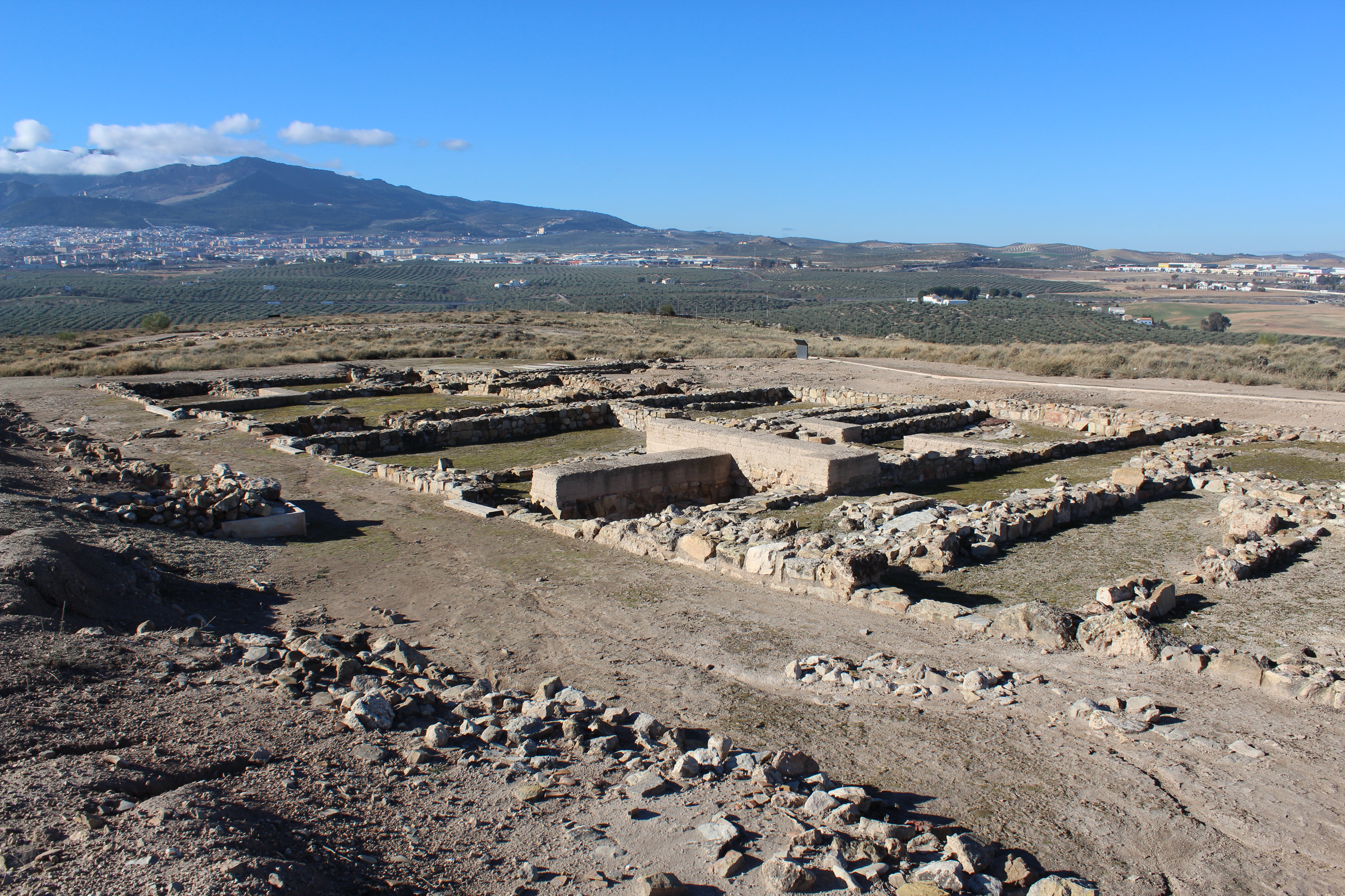 La ciudad, en el interior del recinto.